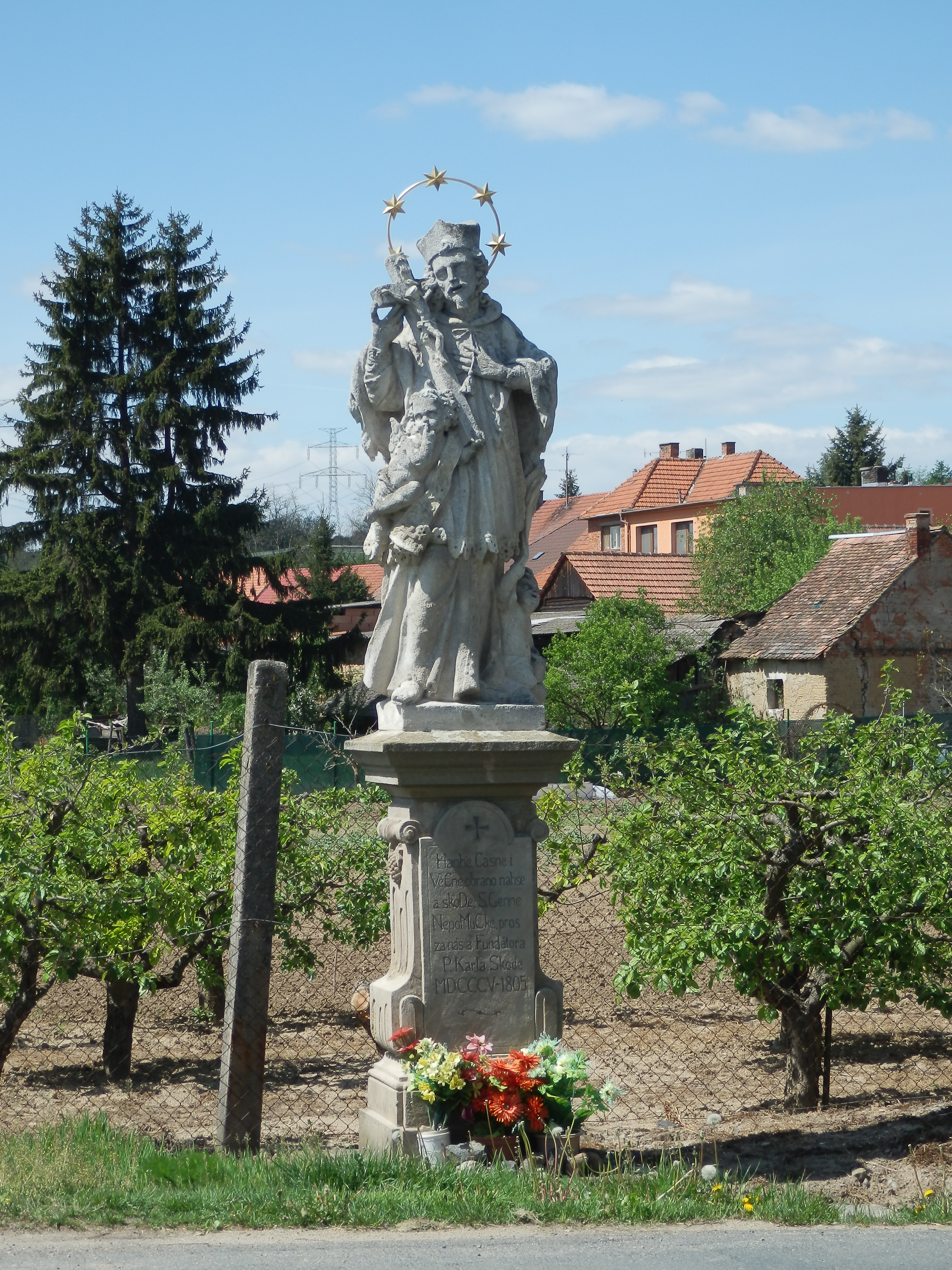 Socha sv. Jana Nepomuckého (Rybníky), při čp. 1, Rybníky